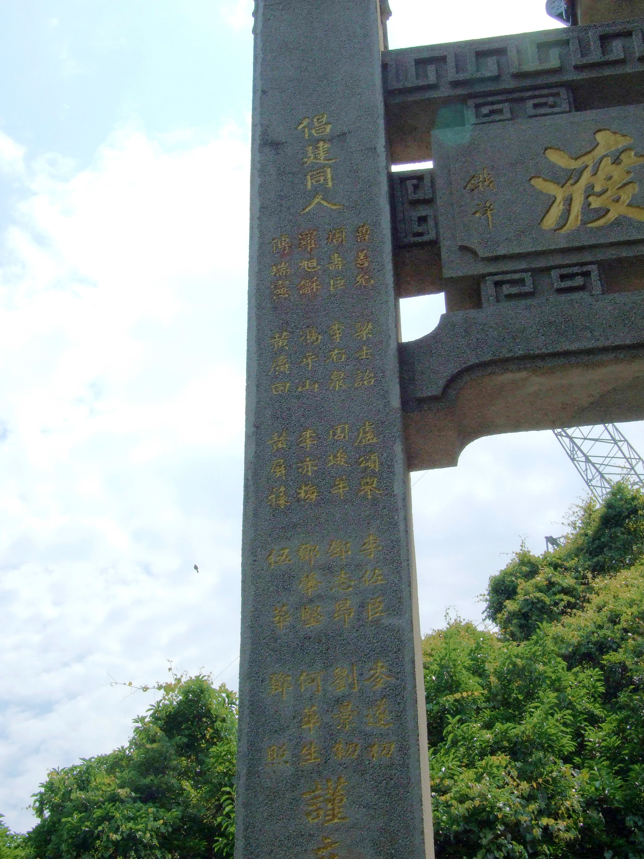 中文（香港）: 香海名山牌樓倡建人芳名